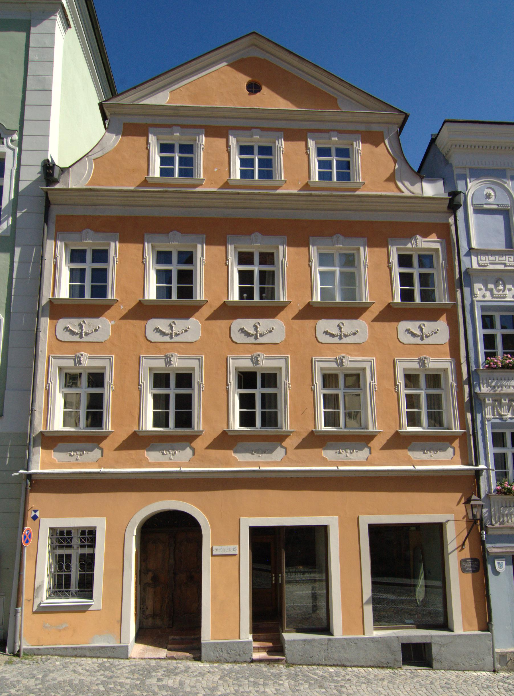 Ehemaliges Landschafts- bzw. Rentamtsgebäude, jetzt Wohn- und GeschäftshausThis is a photograph of an architectural monument.